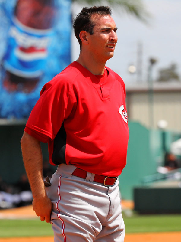 Adam Rosales, Spring Training 2009 22:33, 8 April 2009 . . BubbaFan . . 600×800 (74 KB)